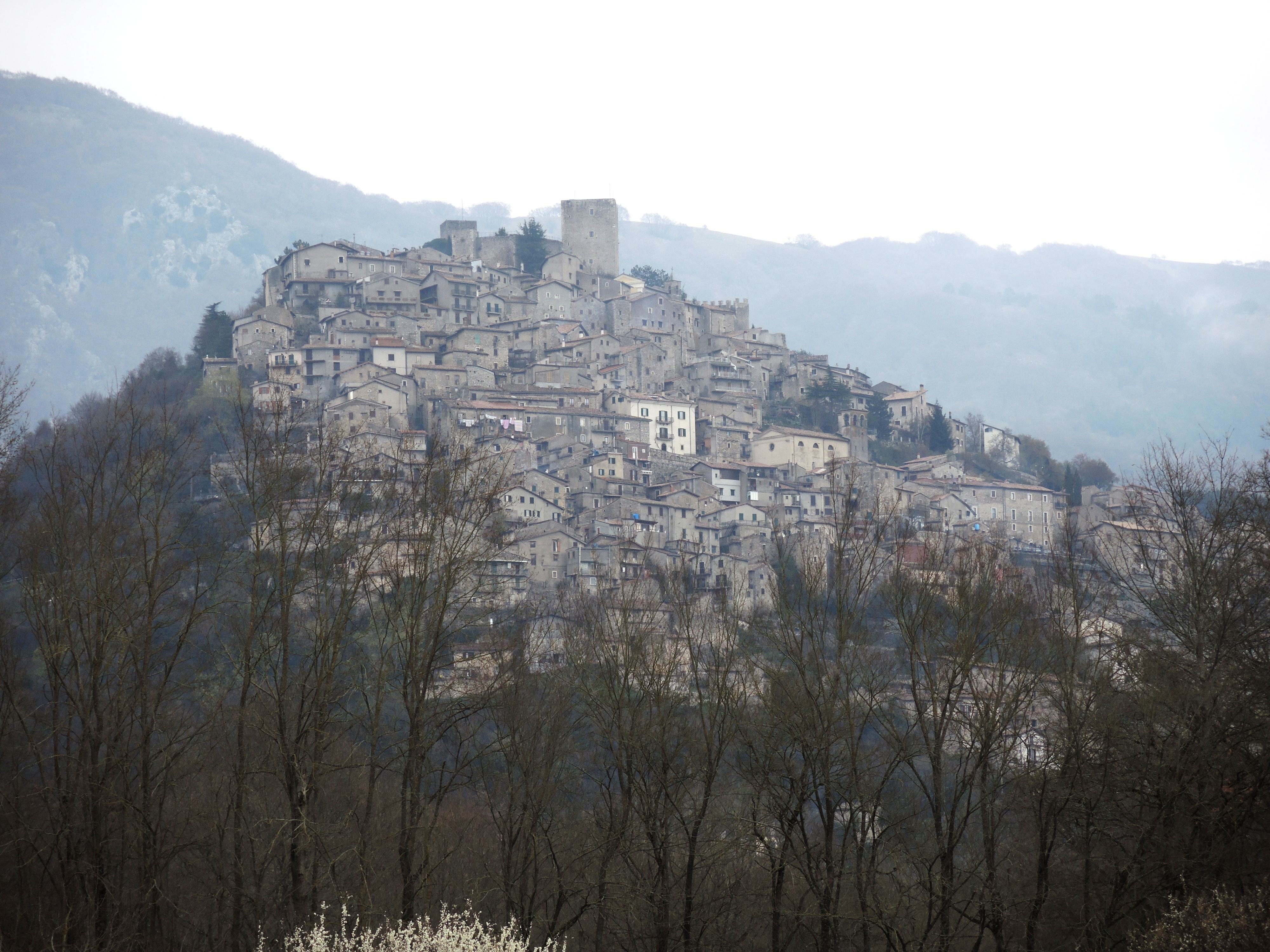 Pereto